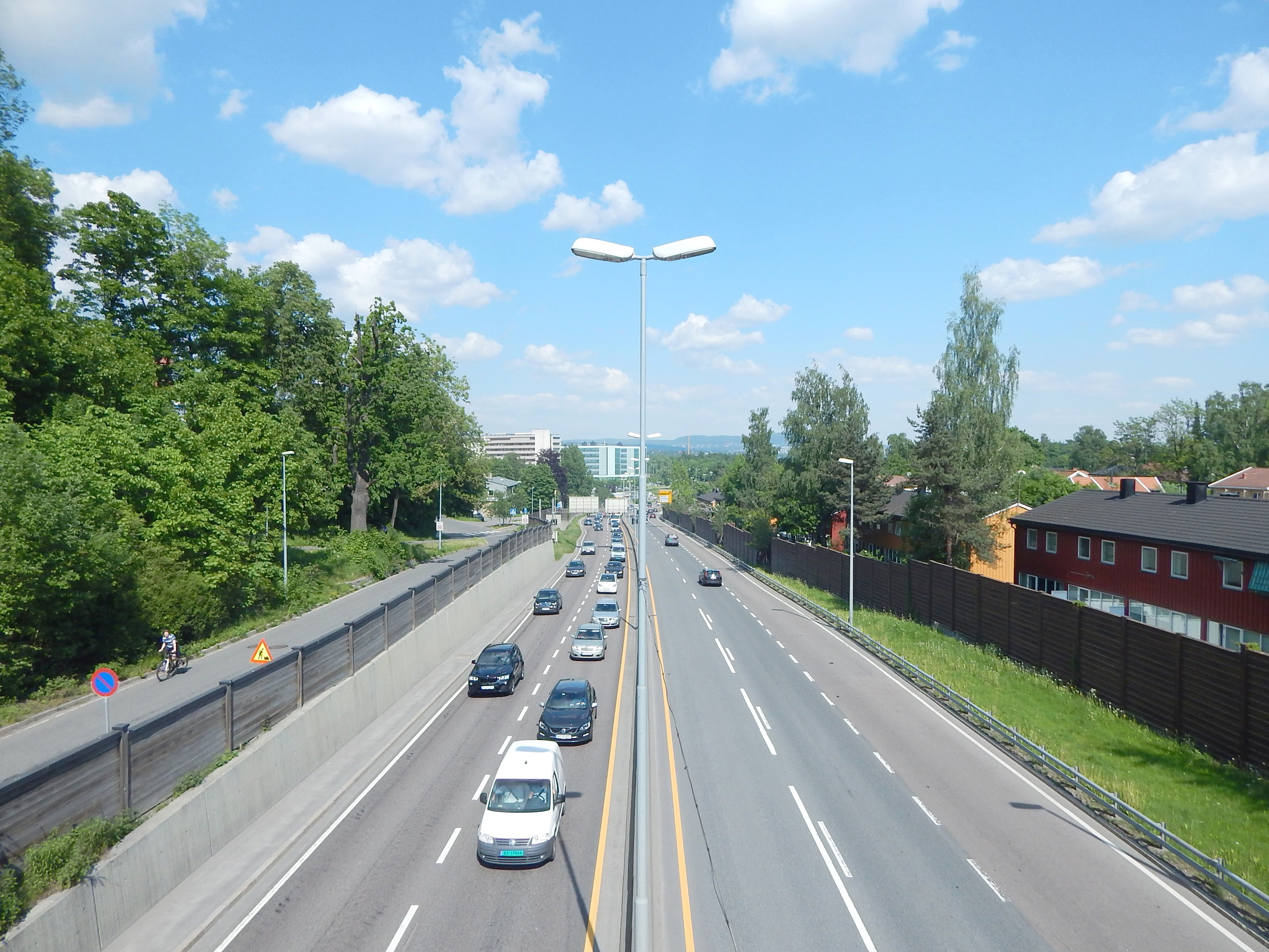 Ullernchausseen østover